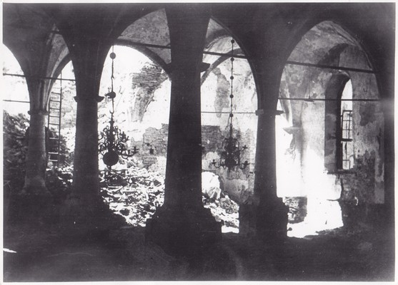 Muuseumikogu Fotokogu Muuseumikogu Fotokogu 1944 pildistamine Eesti Narva